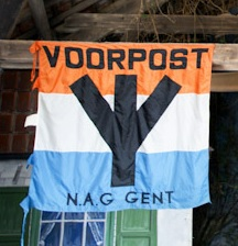 Een afdelingsvlag van de nationalistische actiegroep Voorpost. In dit geval die van de Gentse afdeling.